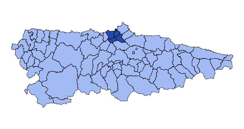 Concejos que forman la mancomunidad asturiana de la Comarca de Avilés